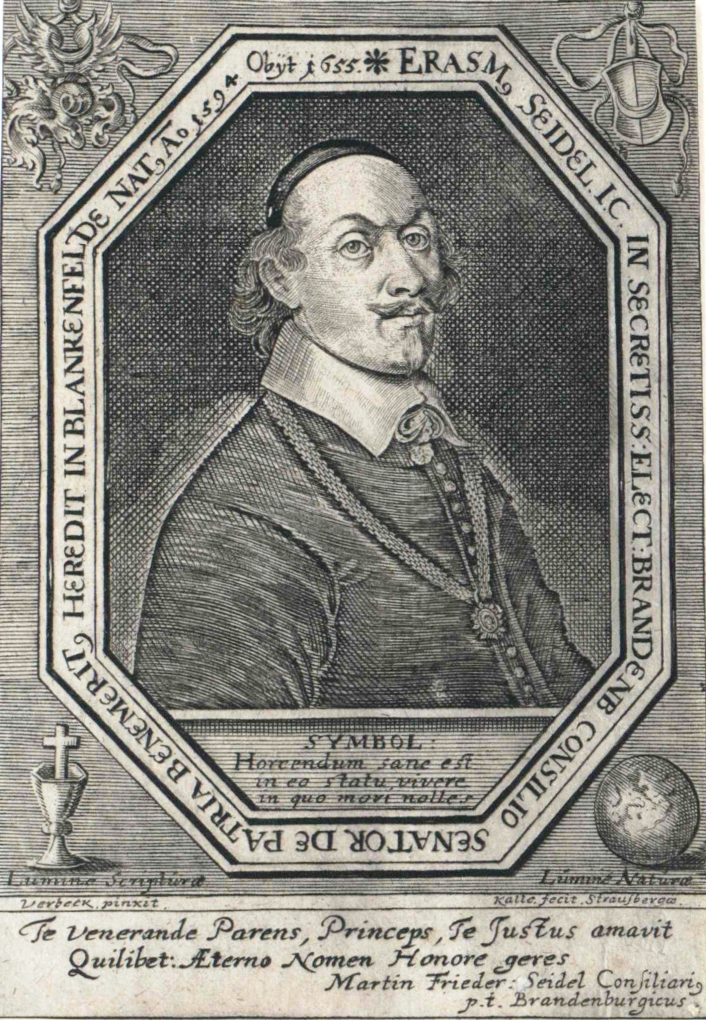 Bildnis des Juristen Erasmus Seidel (1594–1655)